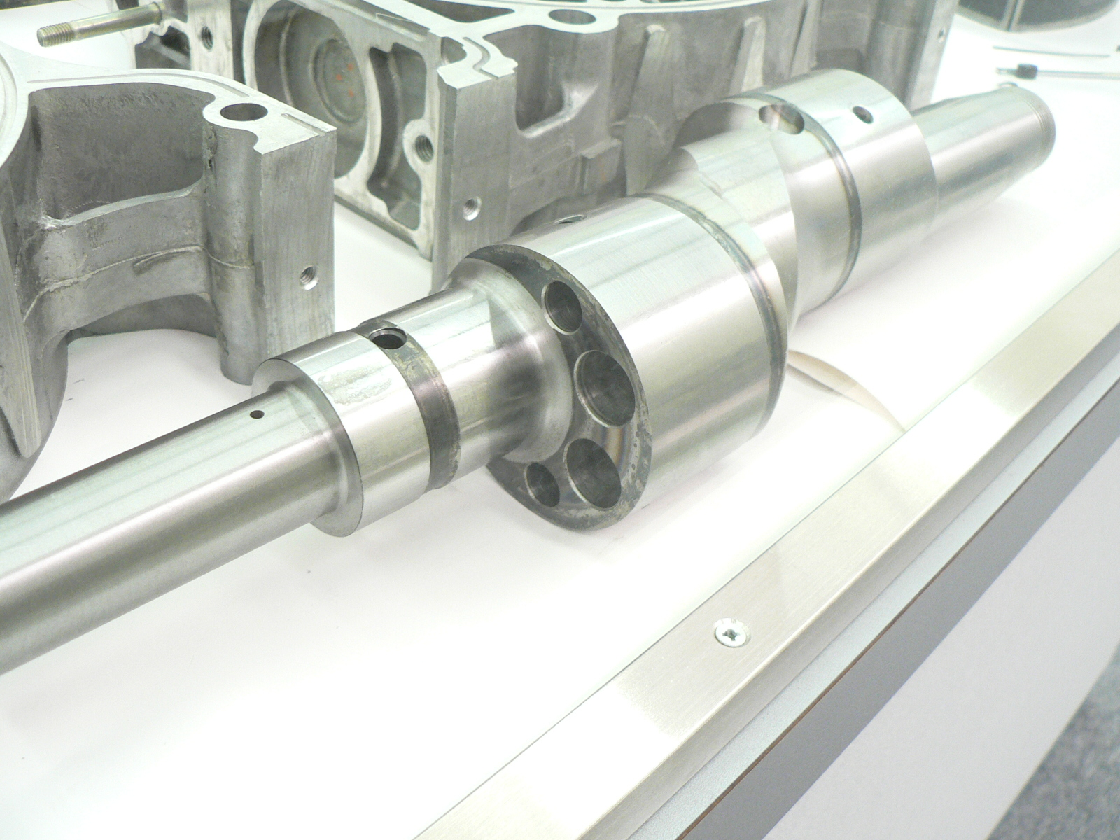 マツダのロータリーエンジン13Bの構成部品。 マツダR&Dセンター横浜で撮影。